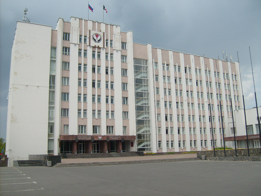 здание Государственного Совета Удмуртской Республики на Карлутской площади в городе Ижевск